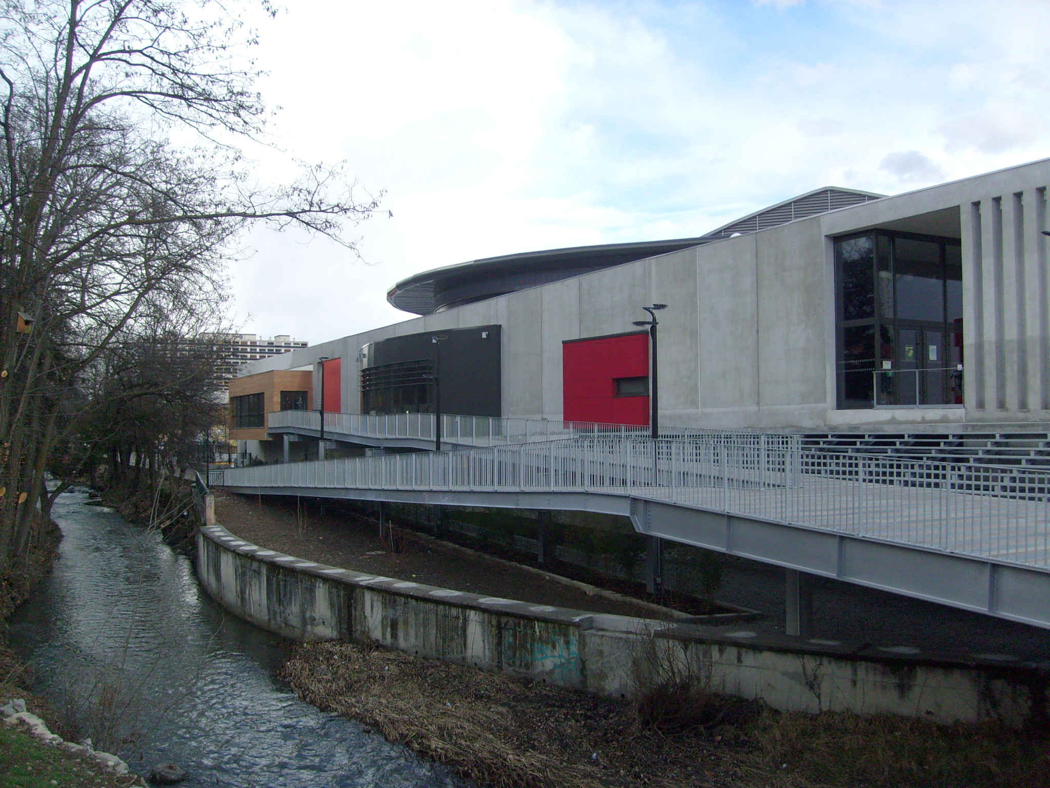 Alp'Arena( aspect extérieur le long de la rivière la Luye)